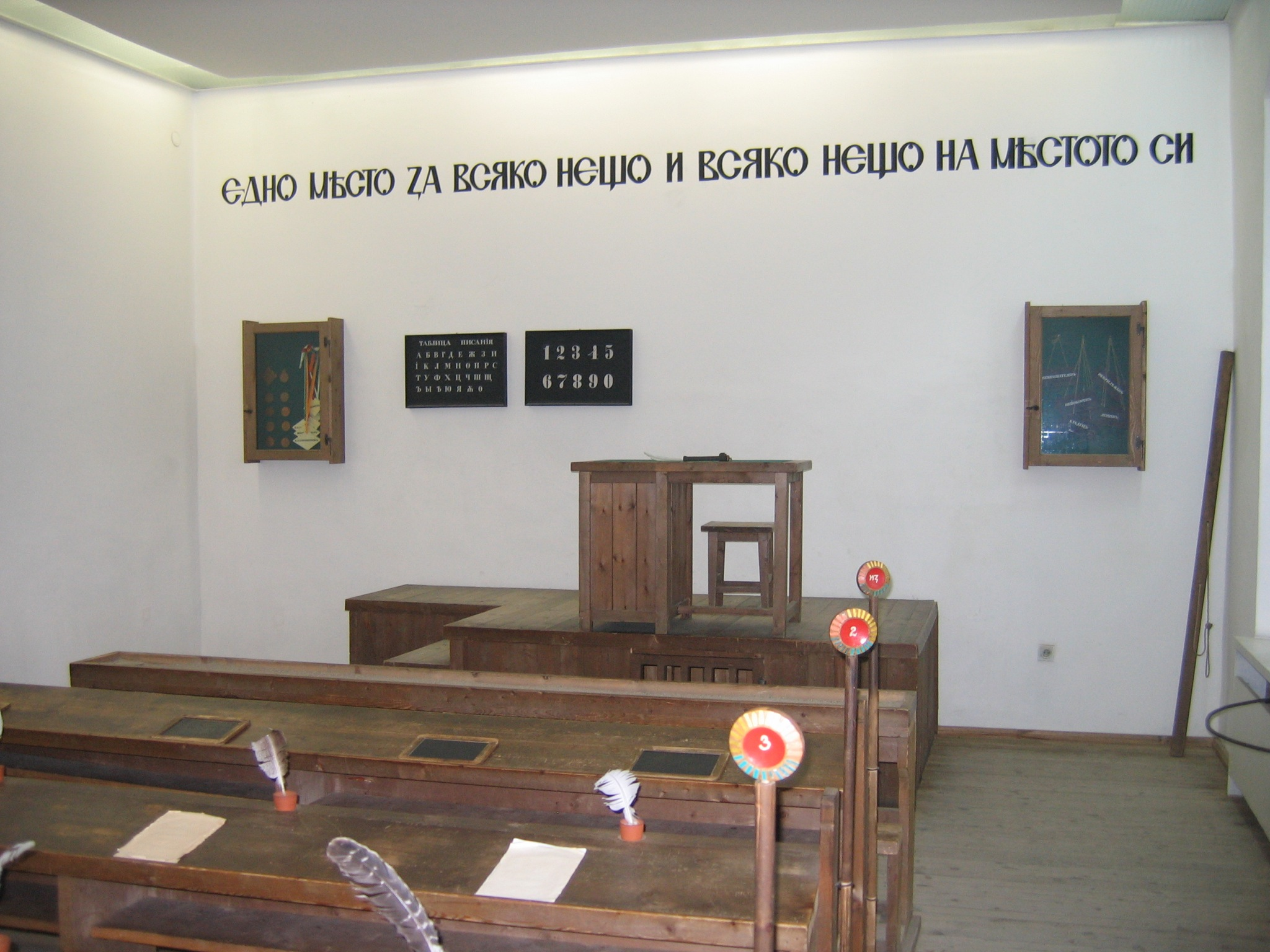 Първото българско класно училище, класна стая